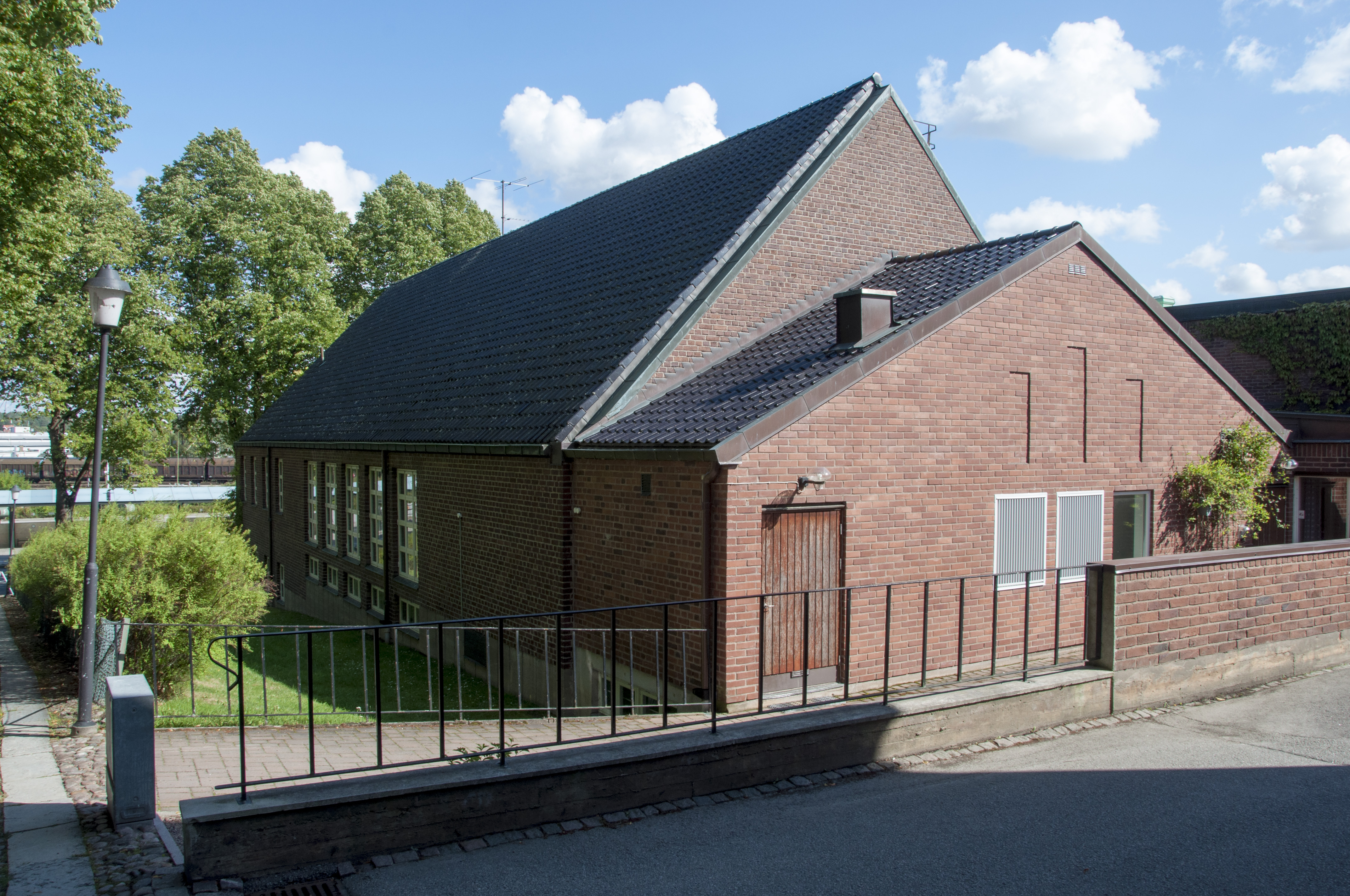 Församlingshemmet, Mariestad. Ritat av Gilbert Sultan 1959. Västra delen av Gunnar Selander och Lennart Sundling 1966.